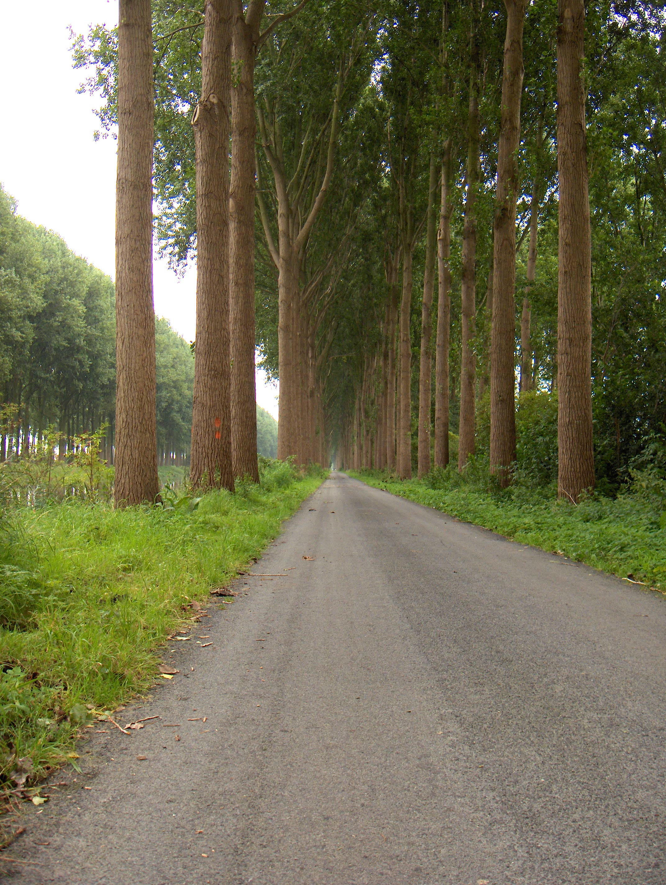 Jaagpad langs het Schipdonkkanaal, traject tussen Moerkerke en de weg Damme Lapscheure